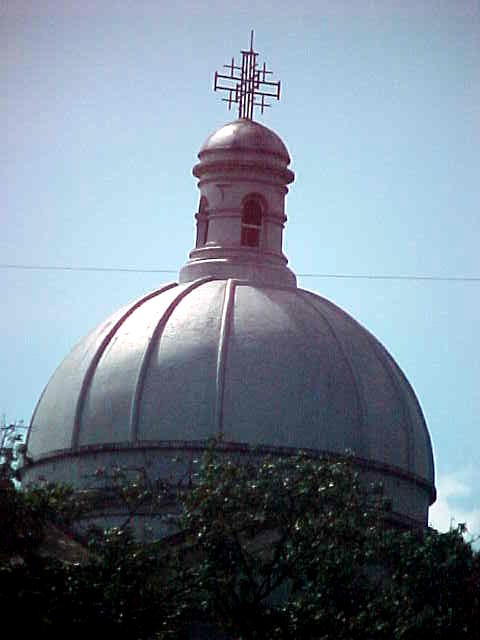 Plaza Capuchinos en el municipio Libertador, Distrito Capital - Venezuela (2000)